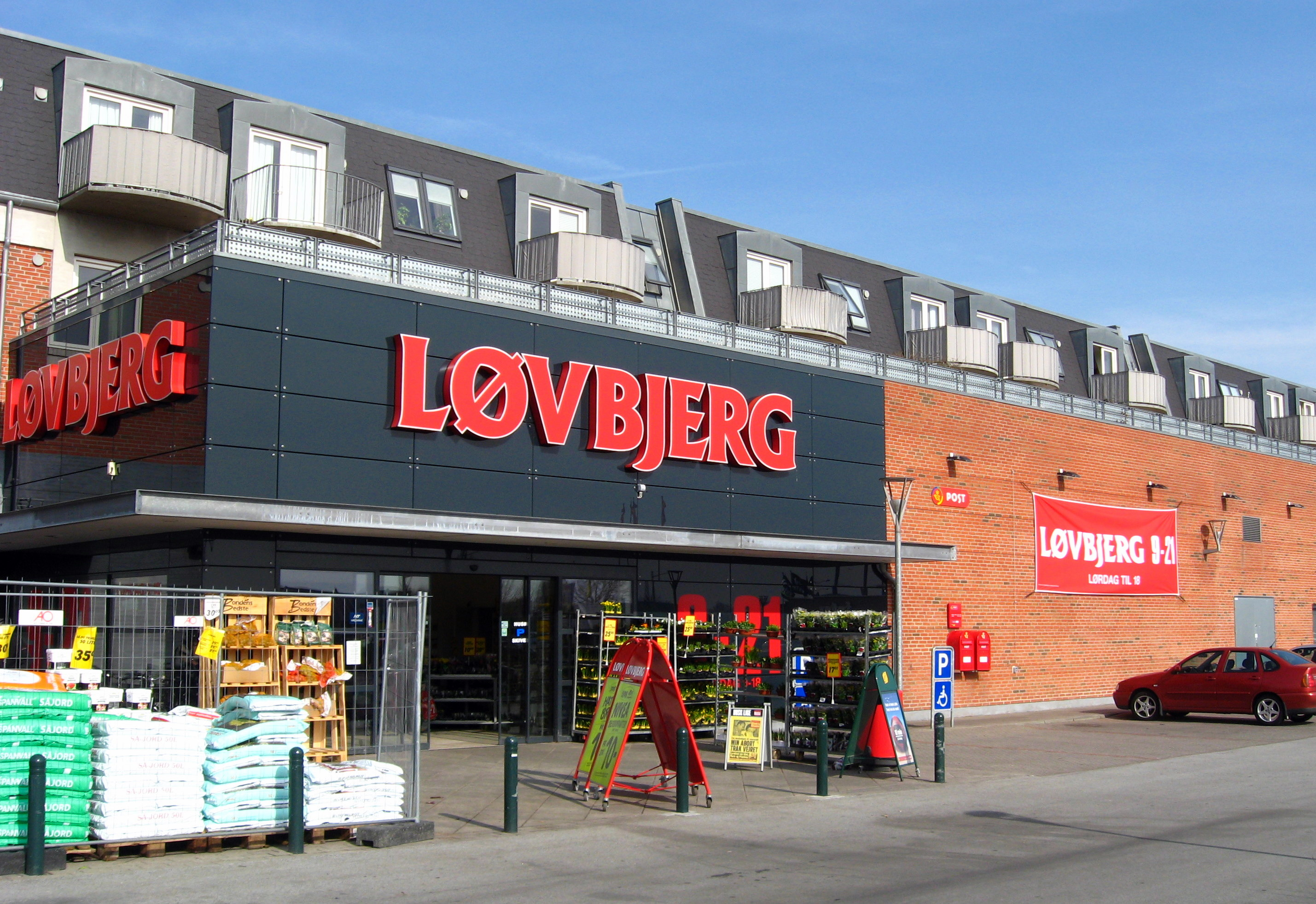 Løvbjerg Supermarked i Brønderslev